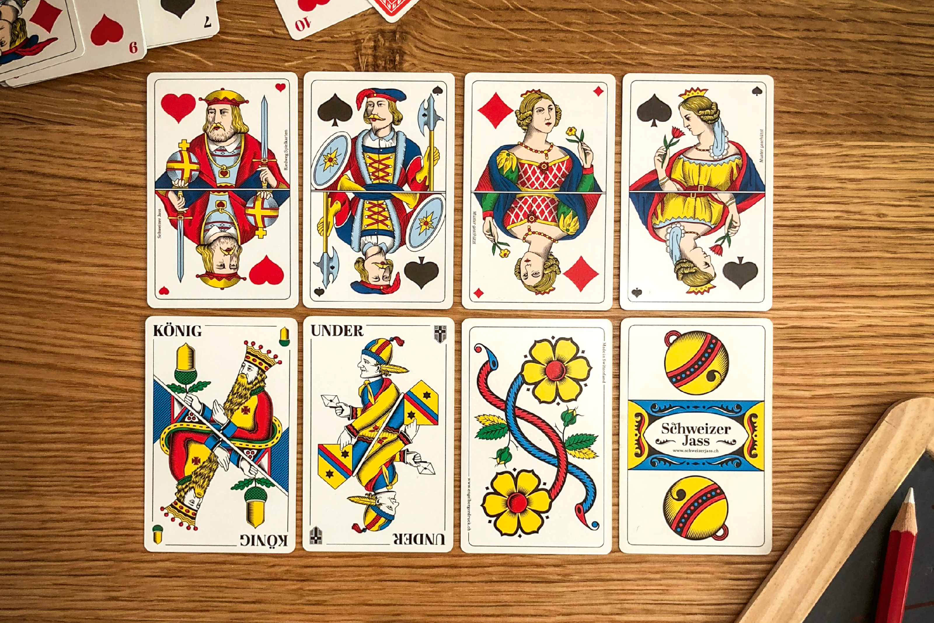 Jasskarten Französische und Deutsch